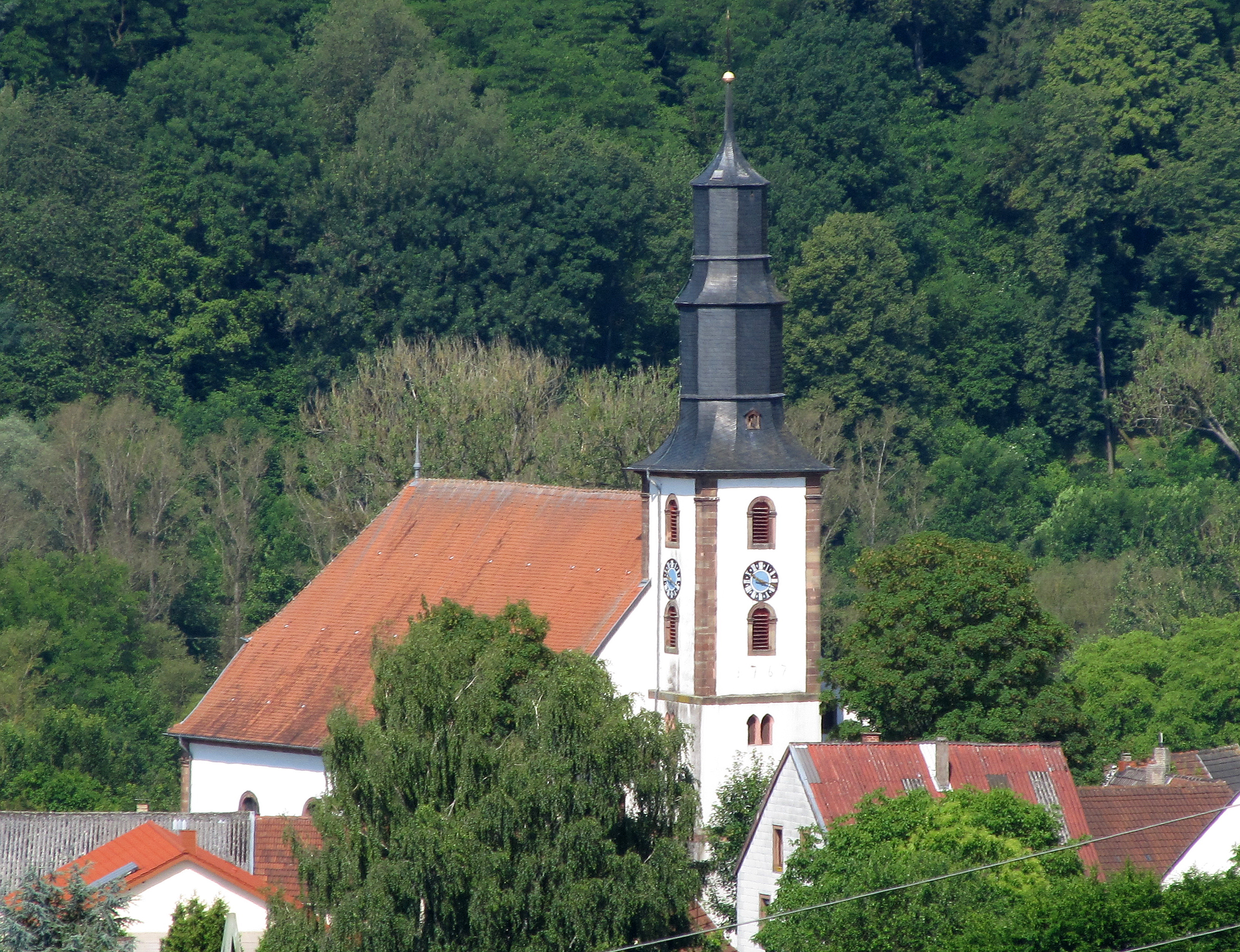 Protestantische Christuskirche Mimbach, Stadt Blieskastel, Saarpfalz-Kreis, Saarland